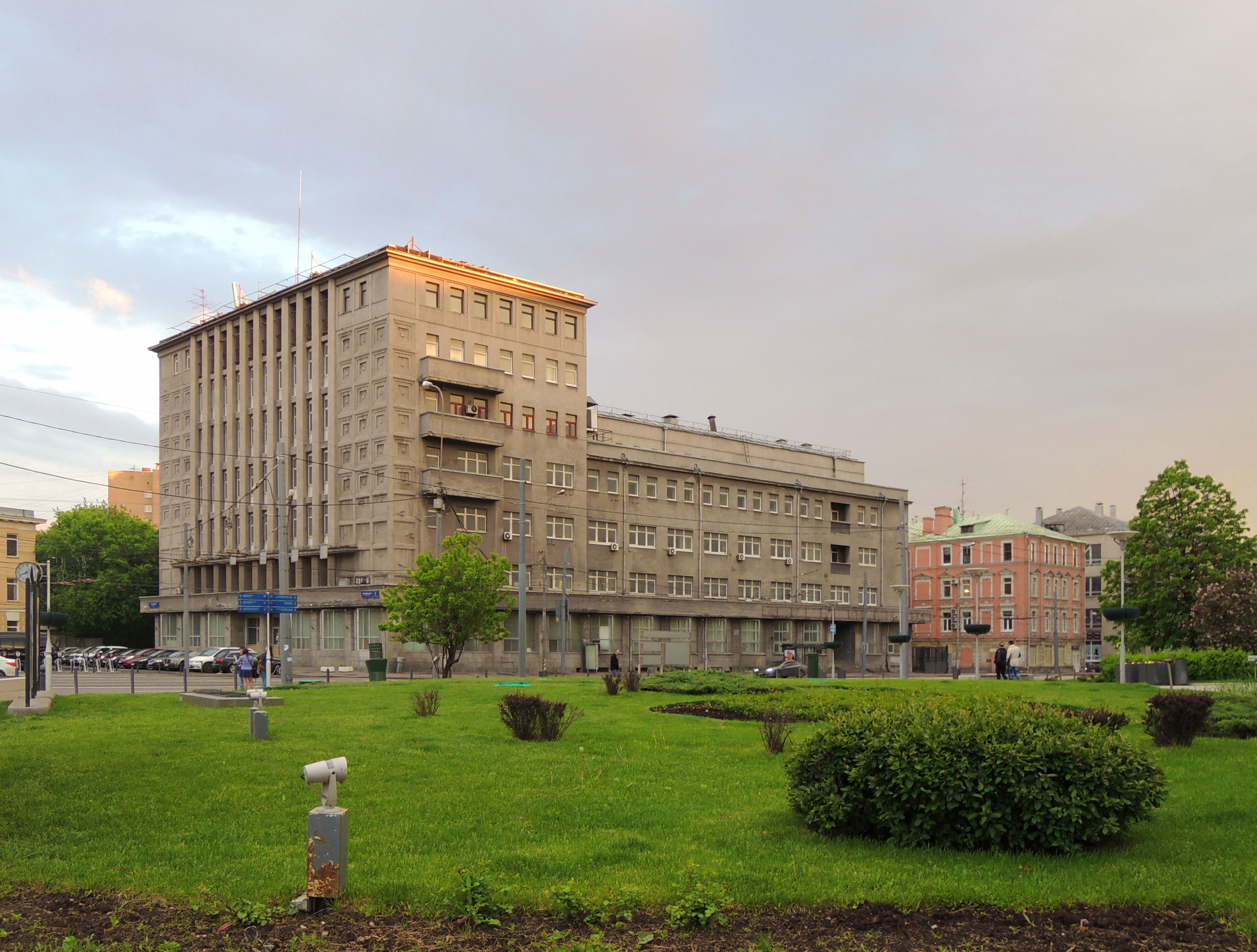 Zubovskaya Square